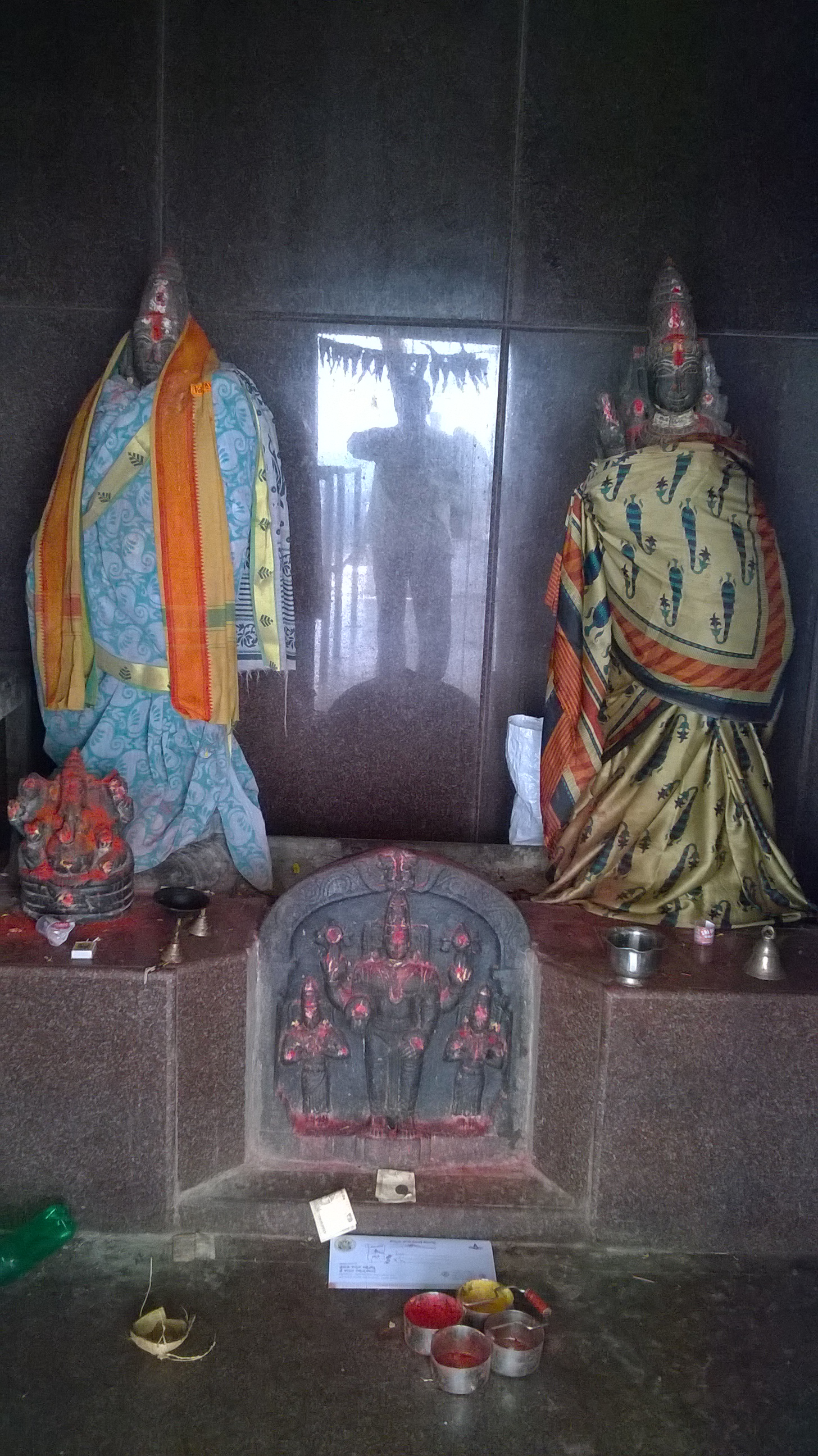 లక్ష్మీదేవి సమేత తిరుమలనాథుడు